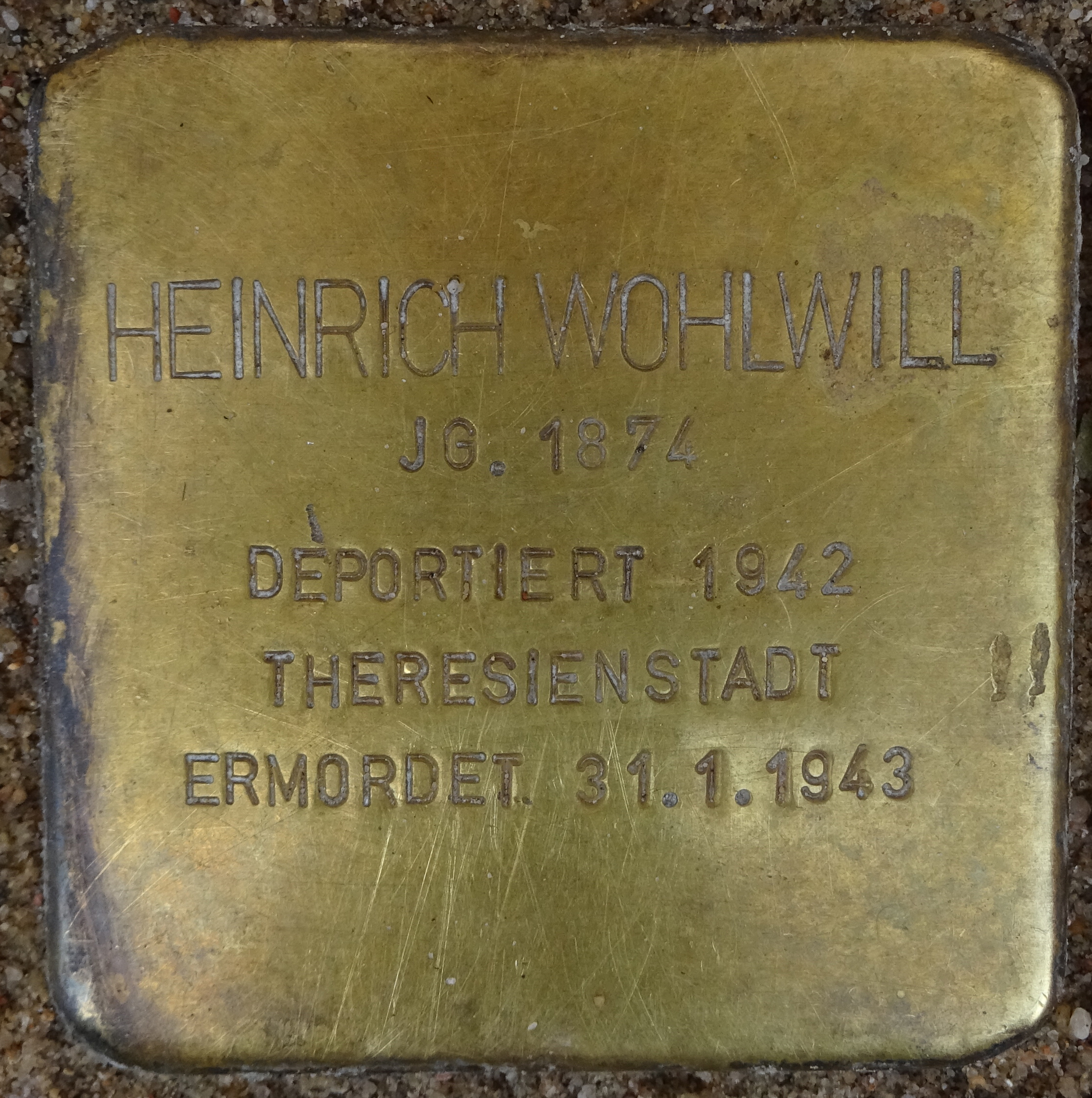 Stolperstein für Heinrich Wohlwill